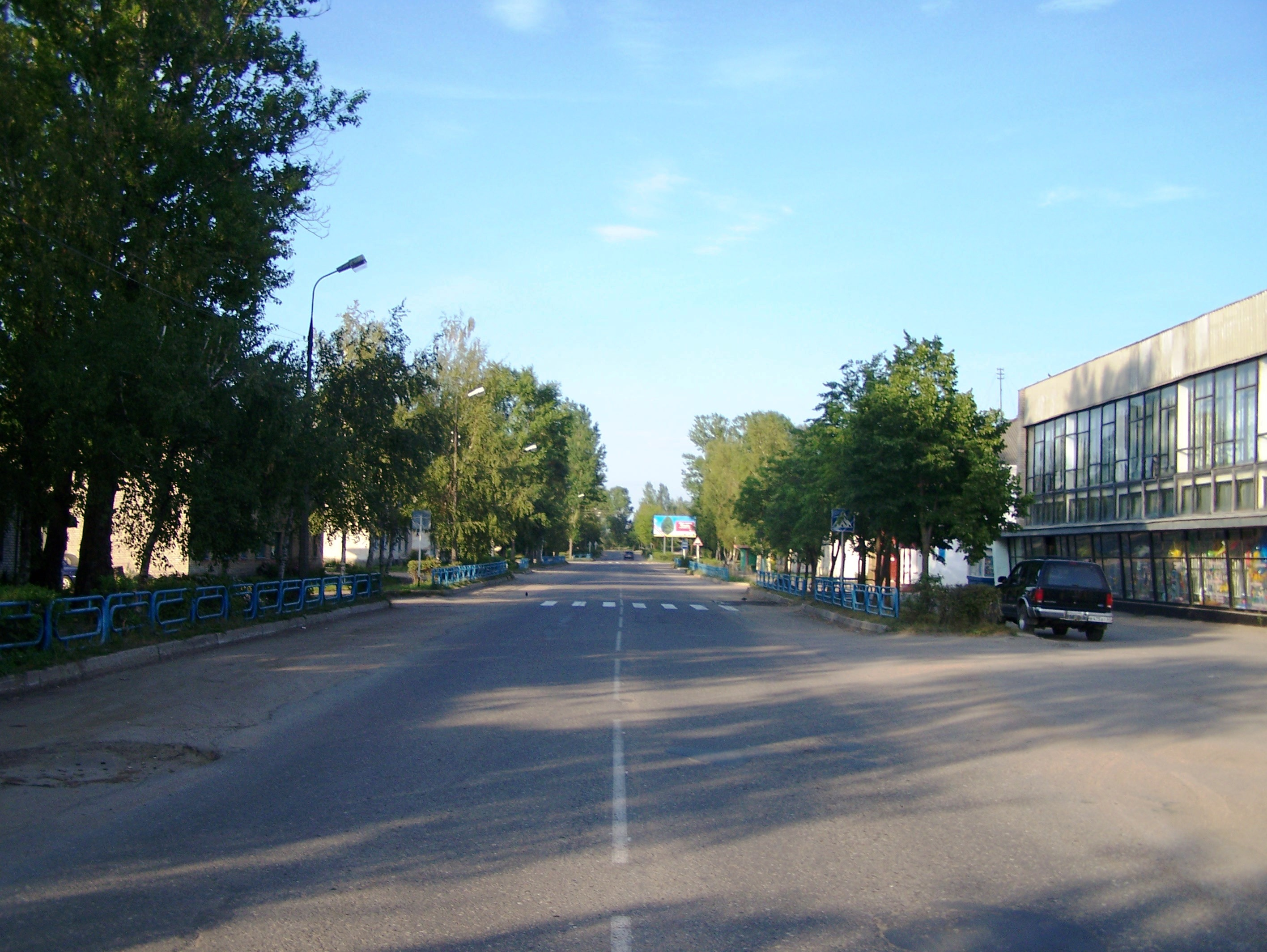 Поселок городского типа Бежаницы. Главная улица.